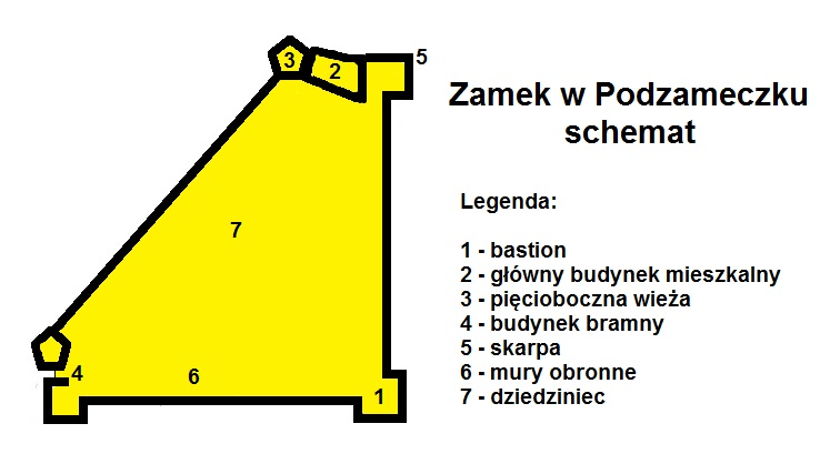 Zamek w Podzameczku schemat